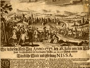 Офорт 1737 года города Ниша